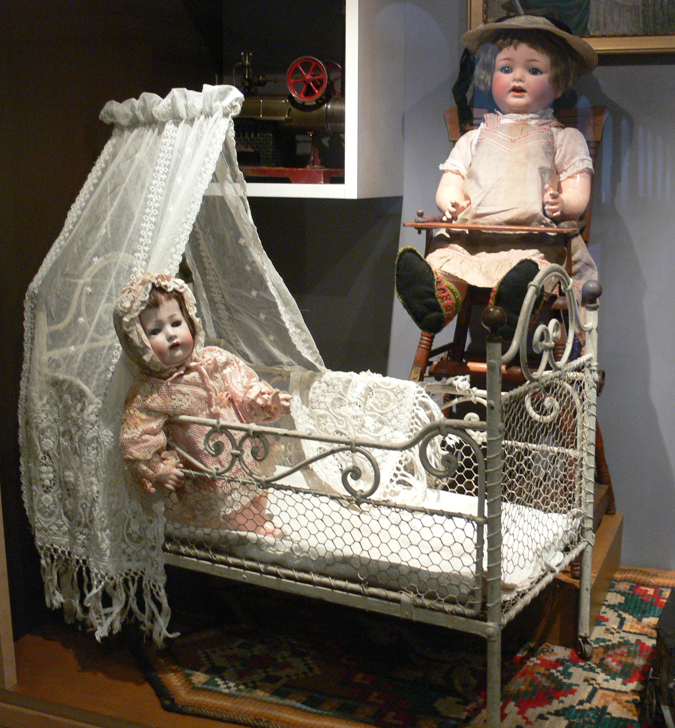 Puppenbett Schloßbergmuseum Chemnitz